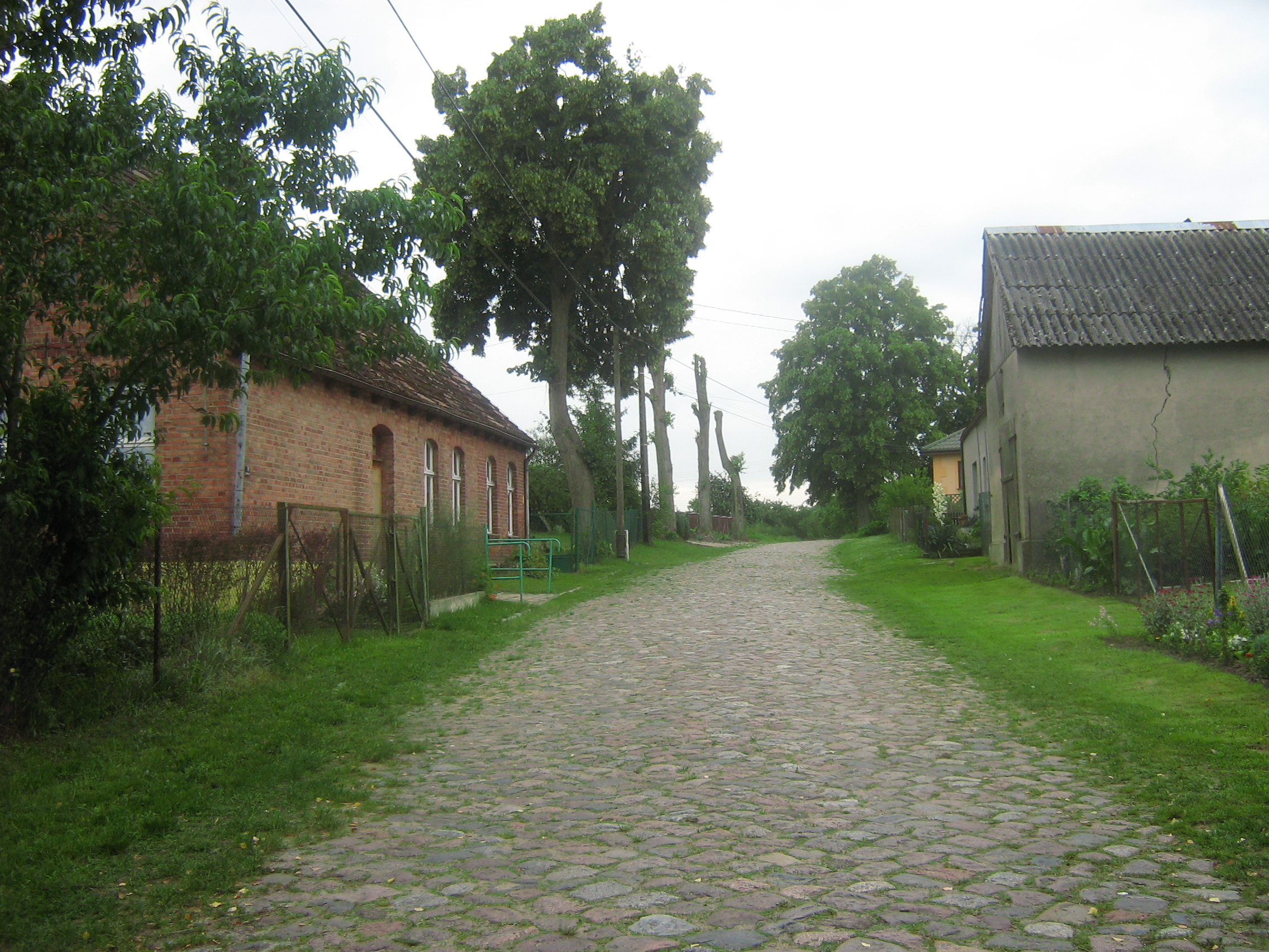 Zabierzewo